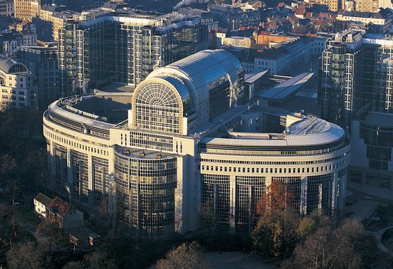 Vue Coté Parc Léopold